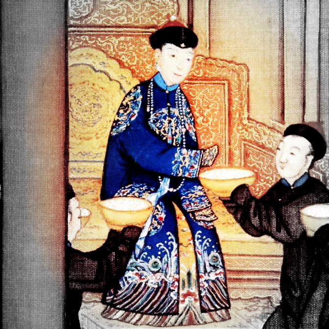 文言: 孝贤纯皇后亲蚕图